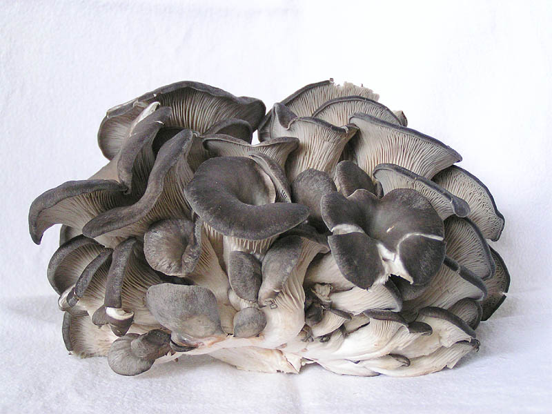 Austernseitling (Pleurotus ostreatus)